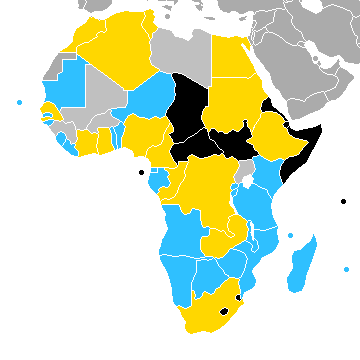 Mapa representativo da melhor colocação no pódio dos países na Copa Africana de Nações.